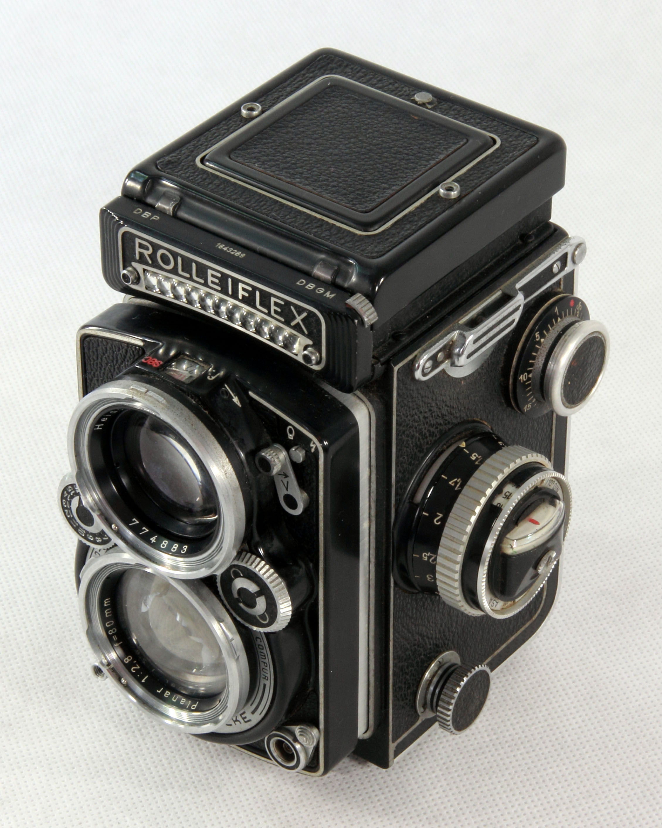 Máquina fotográfica Rolleiflex